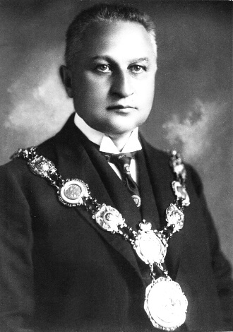 Jiří Baborovský (1875 - 1946), Český fyzikální chemik.